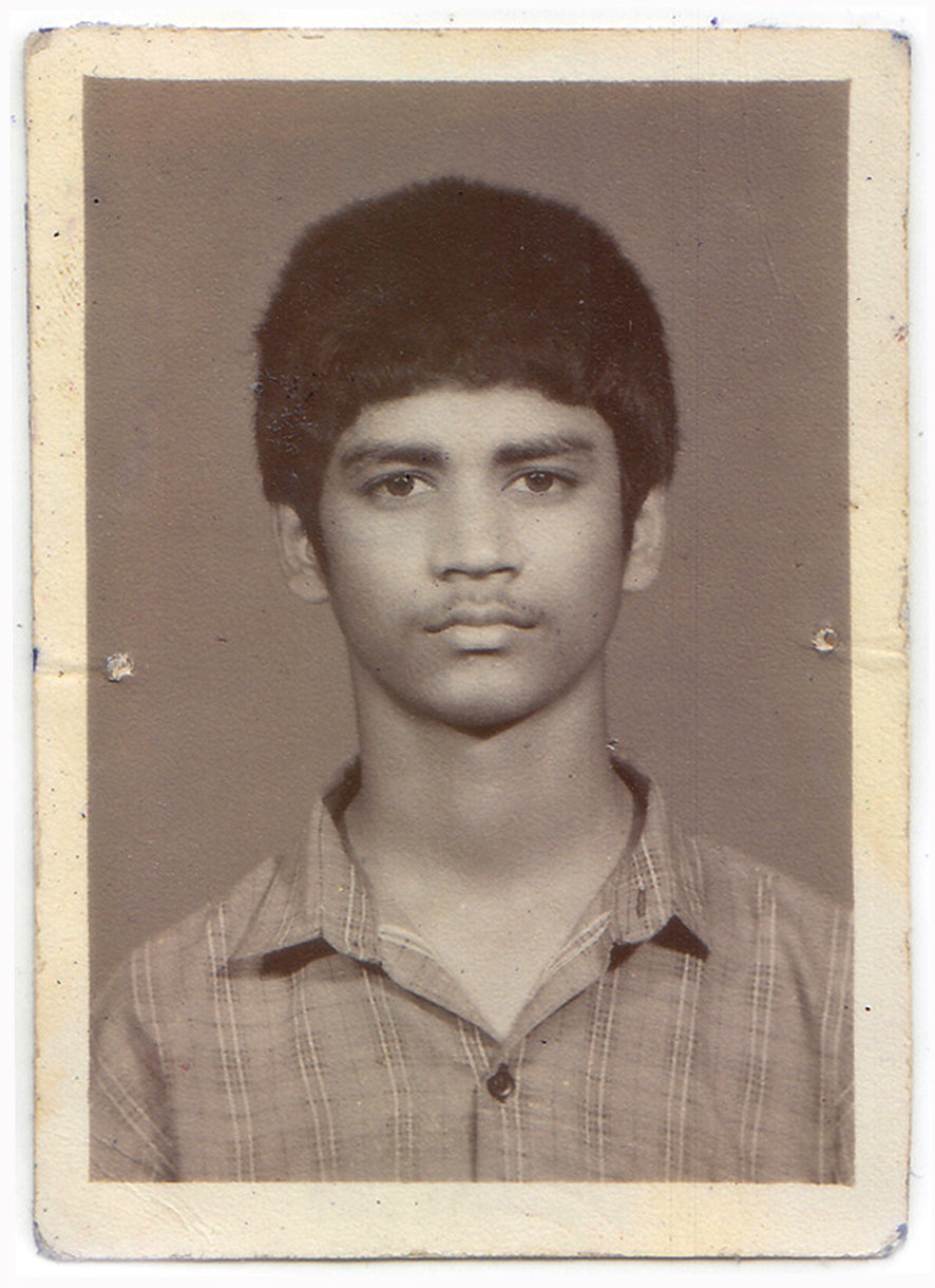 සිංහල: සුජිත් රත්නායක 1989 දී. ඡායාරූපය සේන ප්‍රභා සිටූඩියෝ, තංගල්ල.